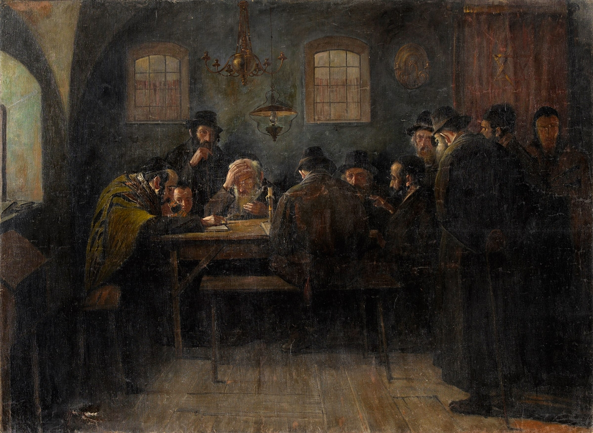 Juden beim Talmudstudium. Bezeichnet: "Paris". Öl auf Leinwand, 110 x 150 cm. Undeutlich signiert.